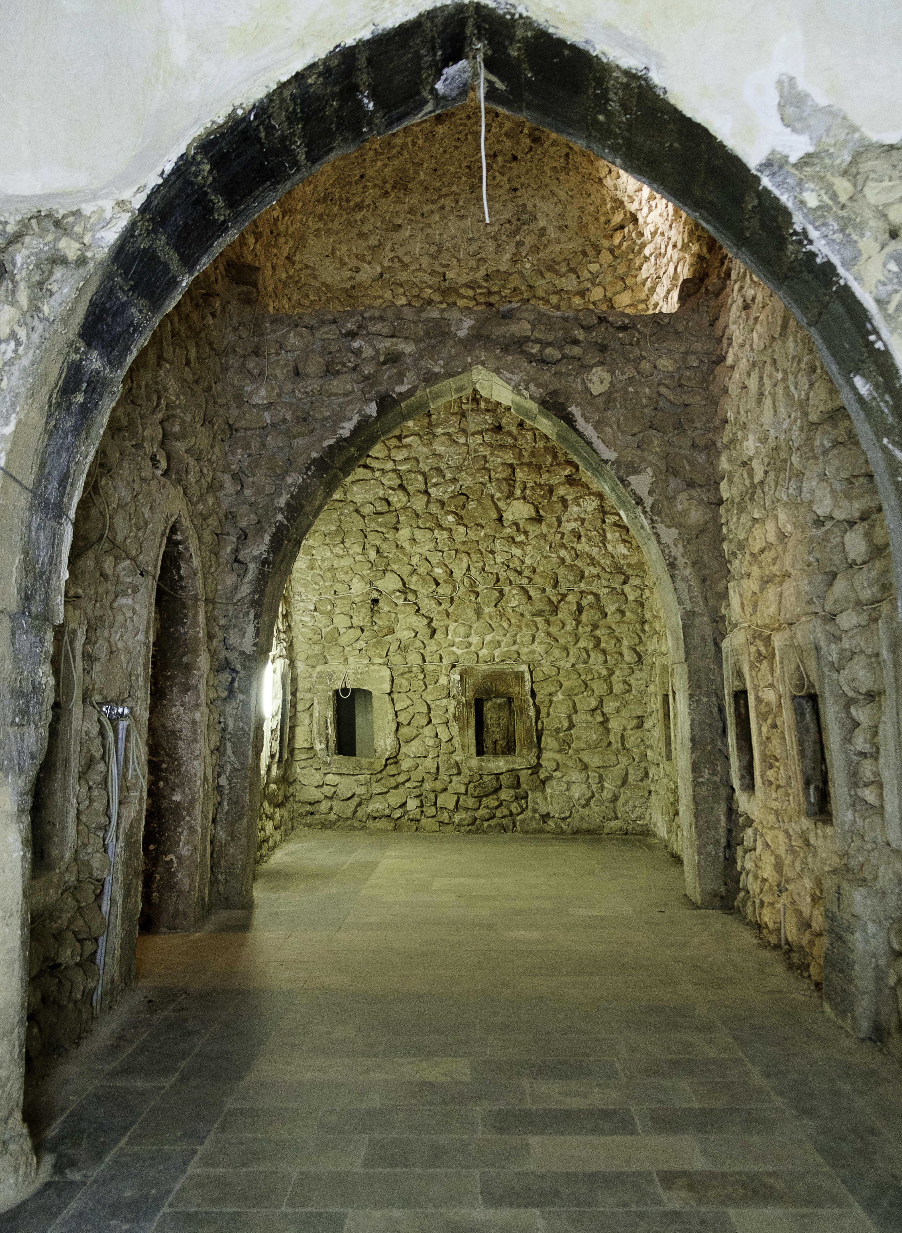 Interior of Rabban Hormizd Monastery